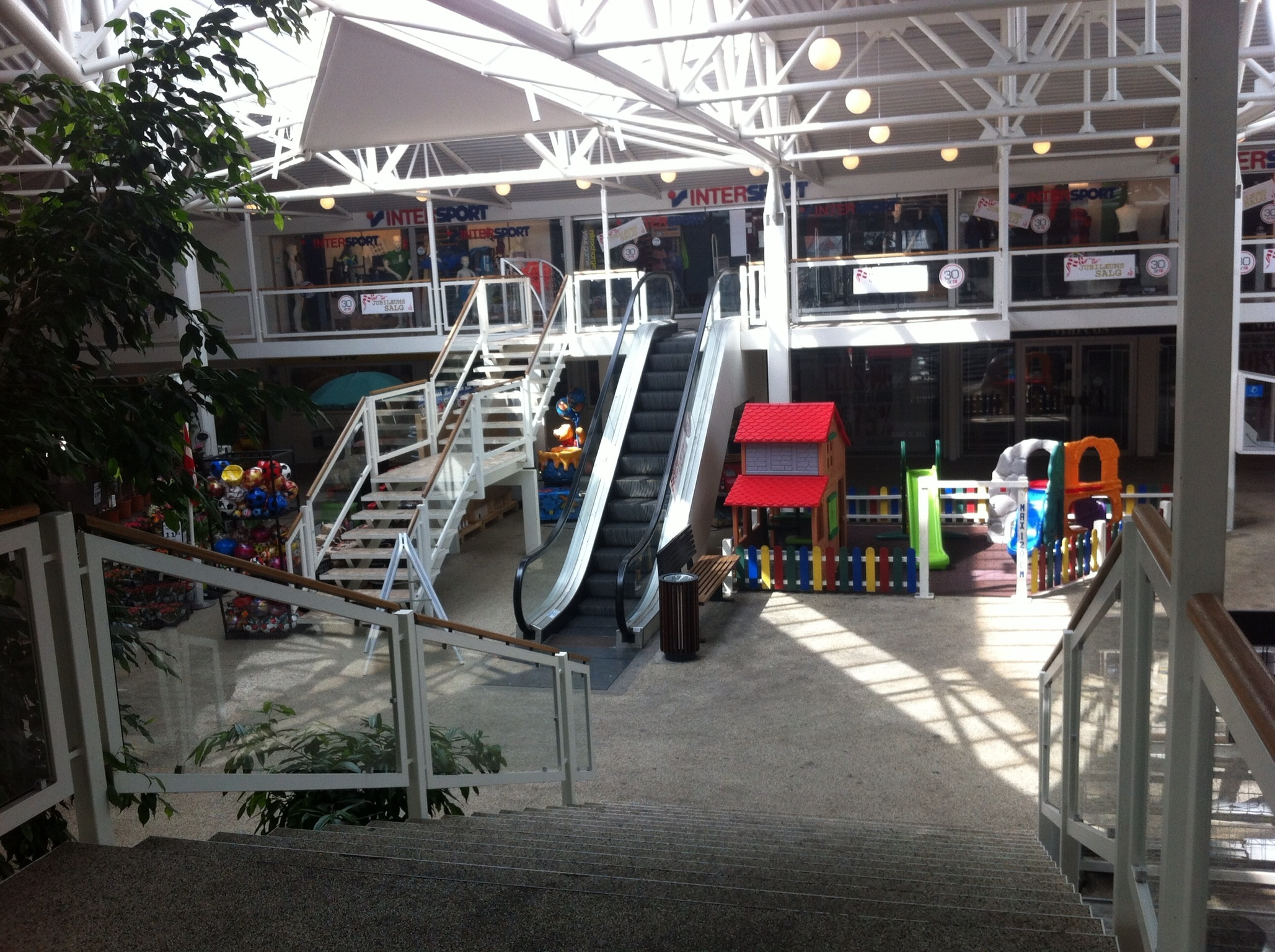 Hadsund Butikscenter, Storegade, 9560 Hadsund.